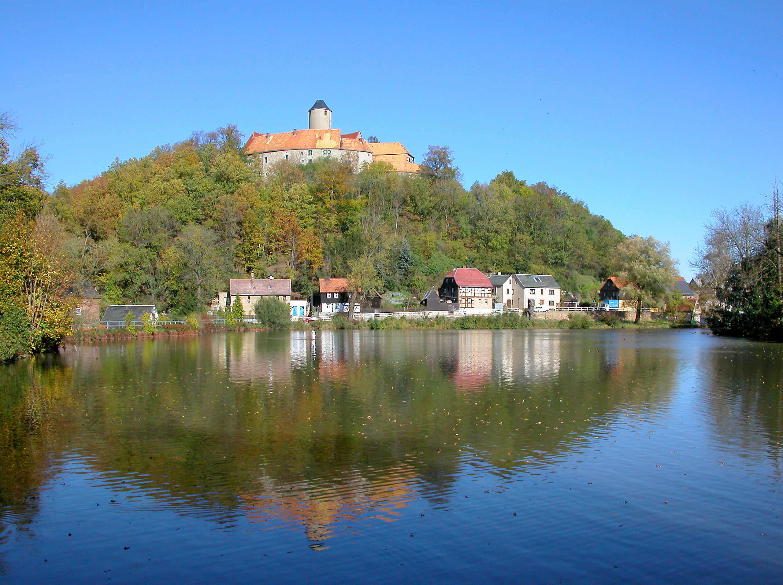 15.10.2007 08115 Schönfels (Gemeinde Lichtentanne), Burgstraße 34 (GMP: 50.675528,12.400822): Burg Altschönfels, gegründet im Hochmittelalter. In der DDR zeitweilig Jugendherberge. Heute Museum, in Gemeindebesitz. Fernsicht von Süden. [DSCN30617.TIF]20071015165DR.JPG(c)Blobelt